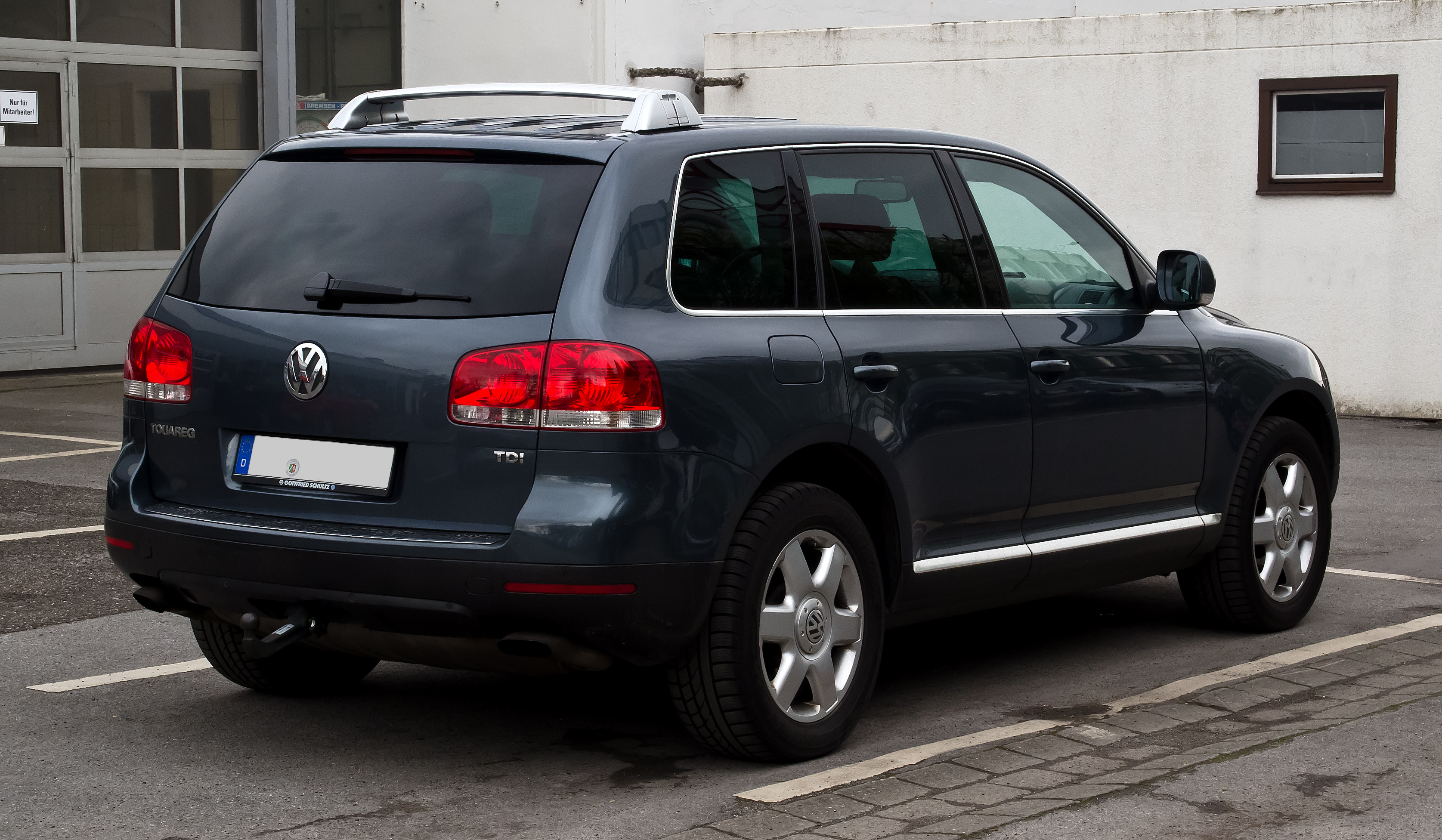 VW Touareg V10 TDI (I)